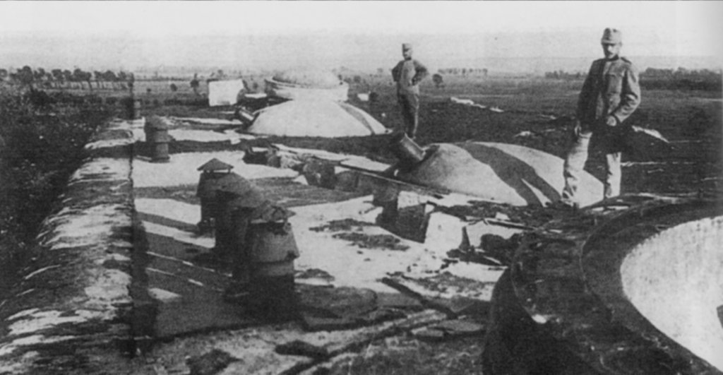 Fort XIII Twierdzy Przemyśl - strop koszar z wieżami pancernymi haubic 15 cm M.94 oraz wieżą obserwacyjną